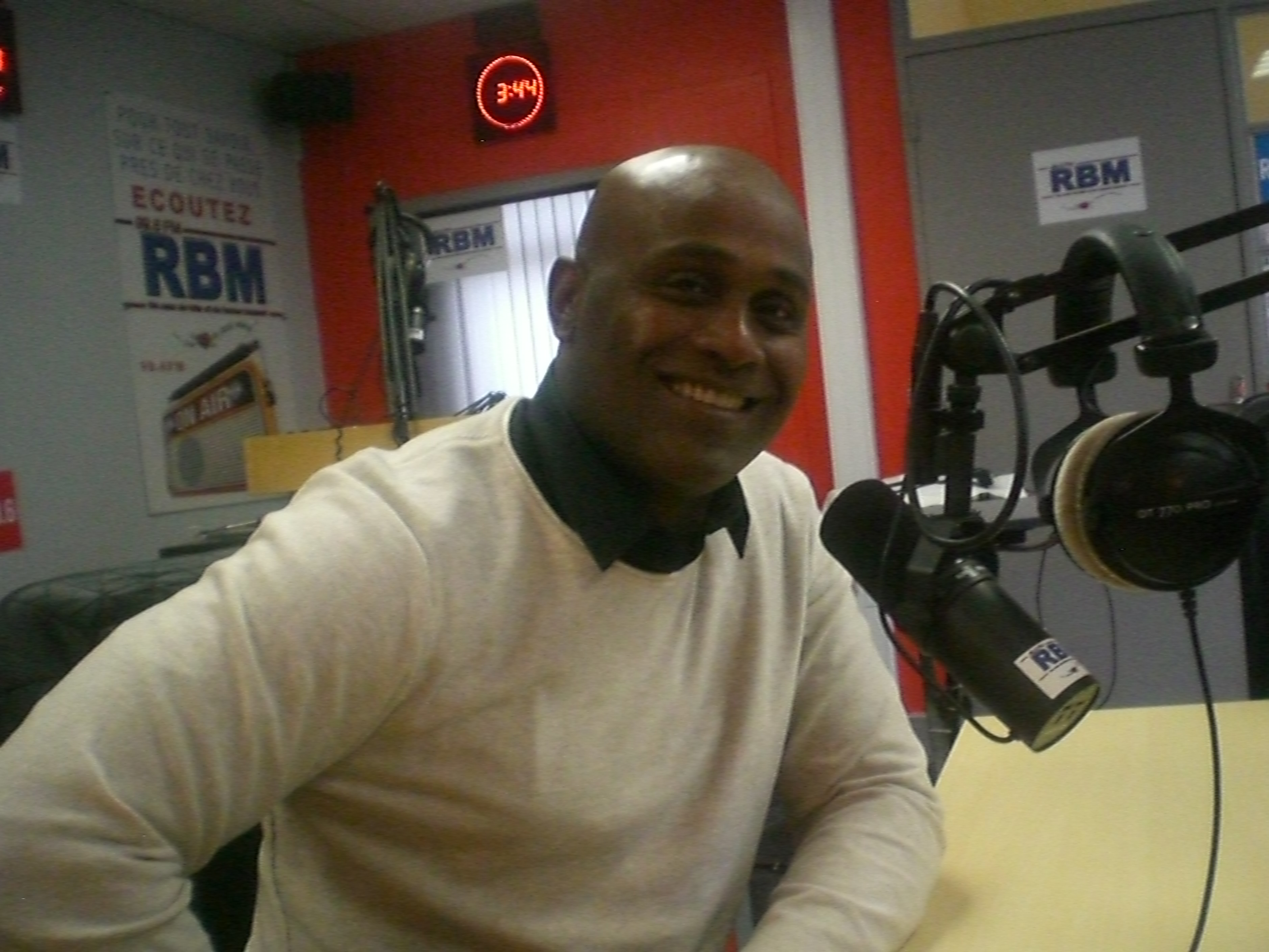 Xavier Méride, au micro de la radio RBM 99.6 FM, lors de l'émission "En Pleine Lucarne", le 17 octobre 2015.